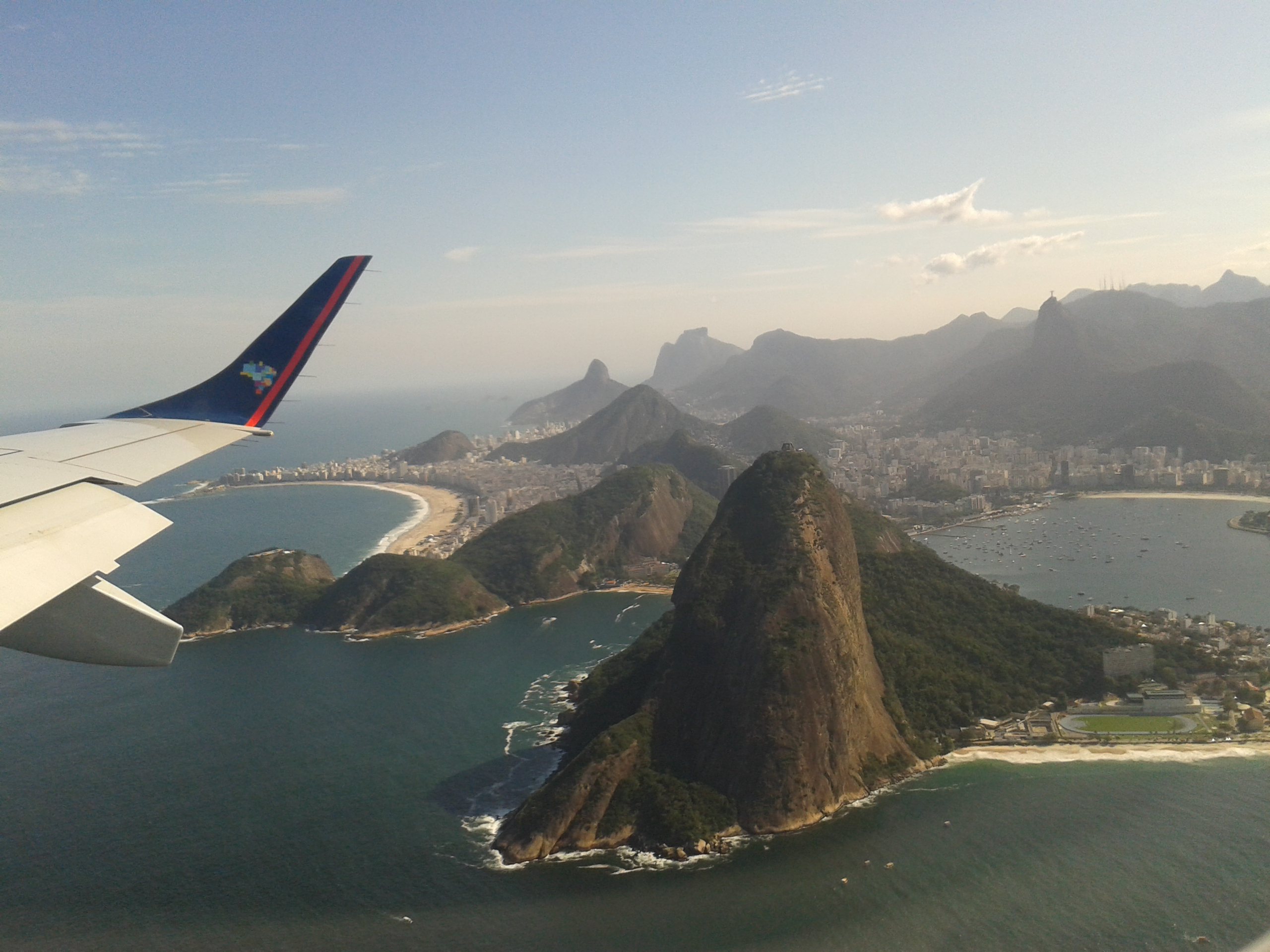 Fotografia da cidade de Rio de Janeiro retirada no dia 17 de agosto de 2014, às 14h40min acima da baía de Guanabara após decolagem da pista 20L do aeroporto Santos Dumont ( SBRJ – SDU). O fotógrafo Gabriel Resende Veiga estava a bordo de um E-195 da Azul Linhas Aéreas batizado de “Azul Acima de Tudo” (PR-AXF, série 00530) no assento 21D cumprindo o voo AD4203 ( Rio de Janeiro – Campinas).